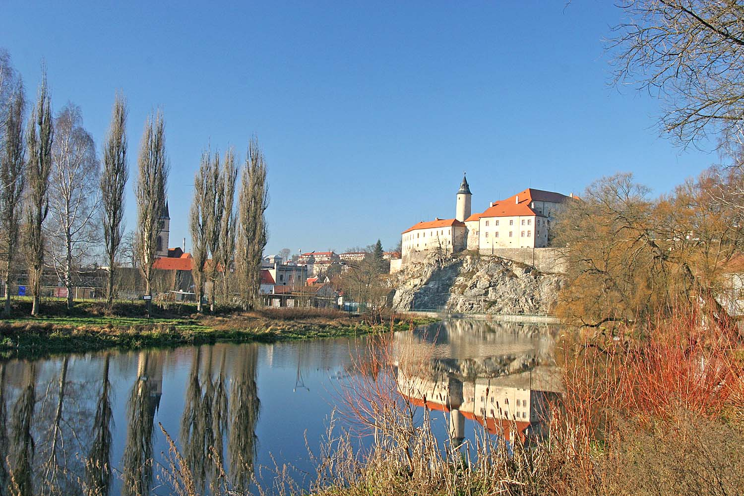 Zámek ve městě Ledeč nad Sázavou, district Havlíčkův Brod